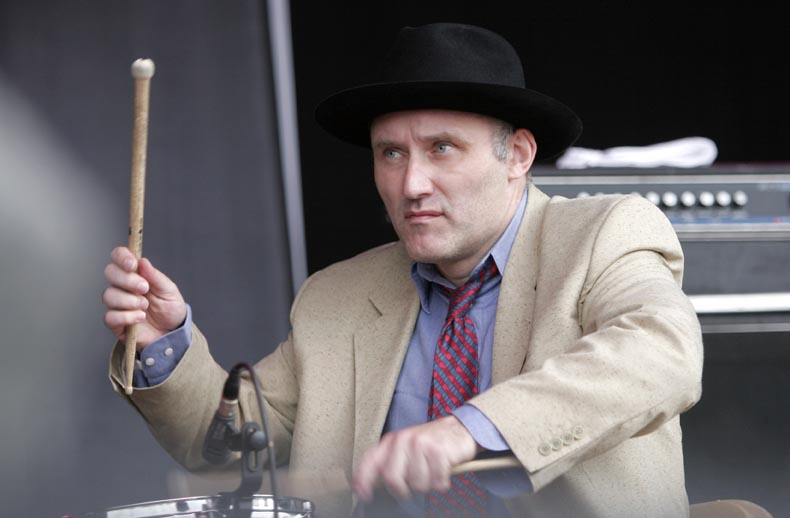 Jah Wobble